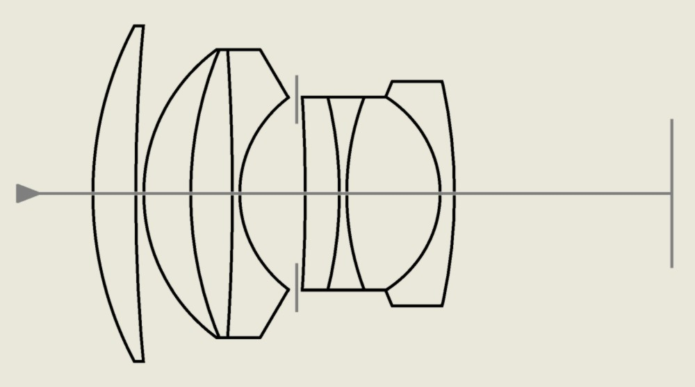 Linsenschema Photographisches Objektiv US Patent 2254511 A (eine) Neurechnung des Contax-Wechselobjektivs „Carl Zeiss Jena Sonnar 1 : 1,5 f = 5 cm“ von 1933 zu einer Öffnung von 1 : 1,4 (ƒ/1,4) Ziel: u. a. Steigerung der Lichtstärke, Reduzierung der Koma Eintrag: 8. März 1940 Veröffentlicht: 2. Sept. 1941 Erfinder: Ludwig Bertele Bevollmächtigter: Zeiss Ikon AG